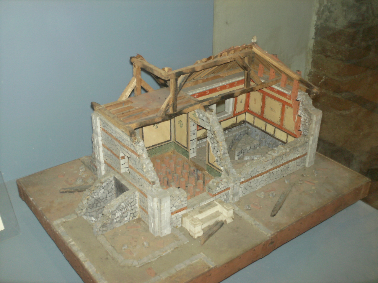 Modell eines Hypokaust- und Schlauchheizungssystems eines Wohnhauses in der Zivilstadt Lauriacum (Römermuseum Enns)